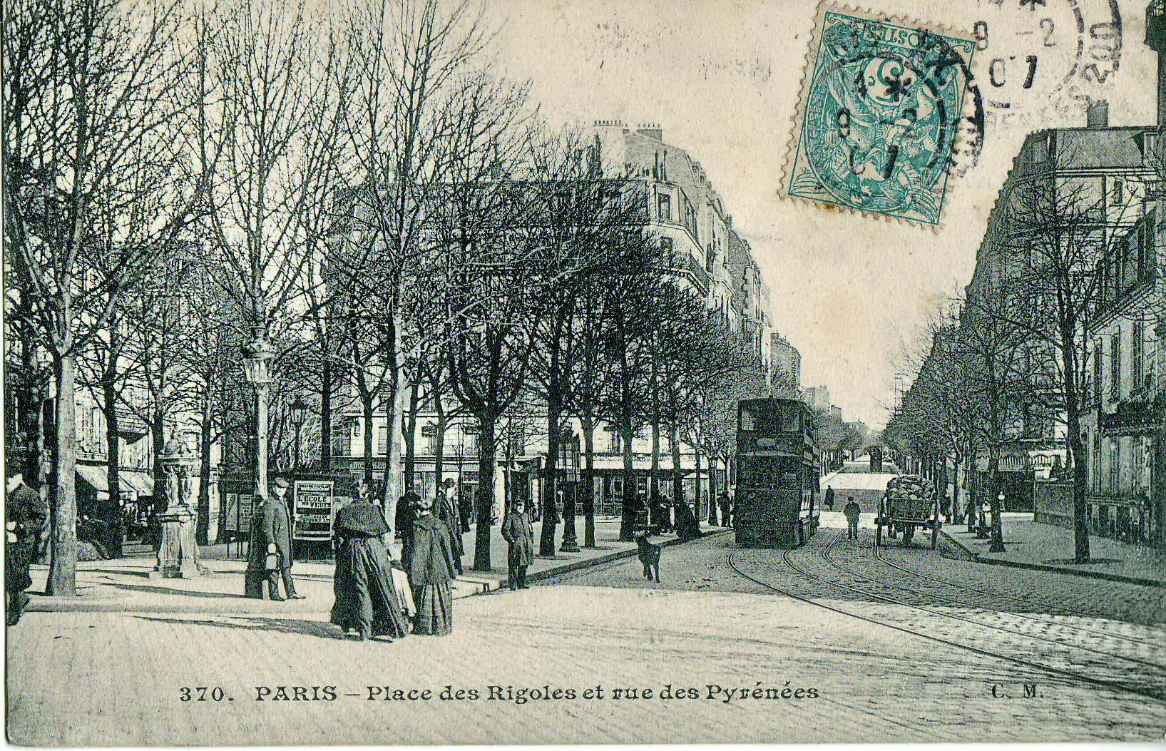 Carte postale ancienne éditée par CM N°370 PARIS : Place des Rigoles et rue des Pyrénées